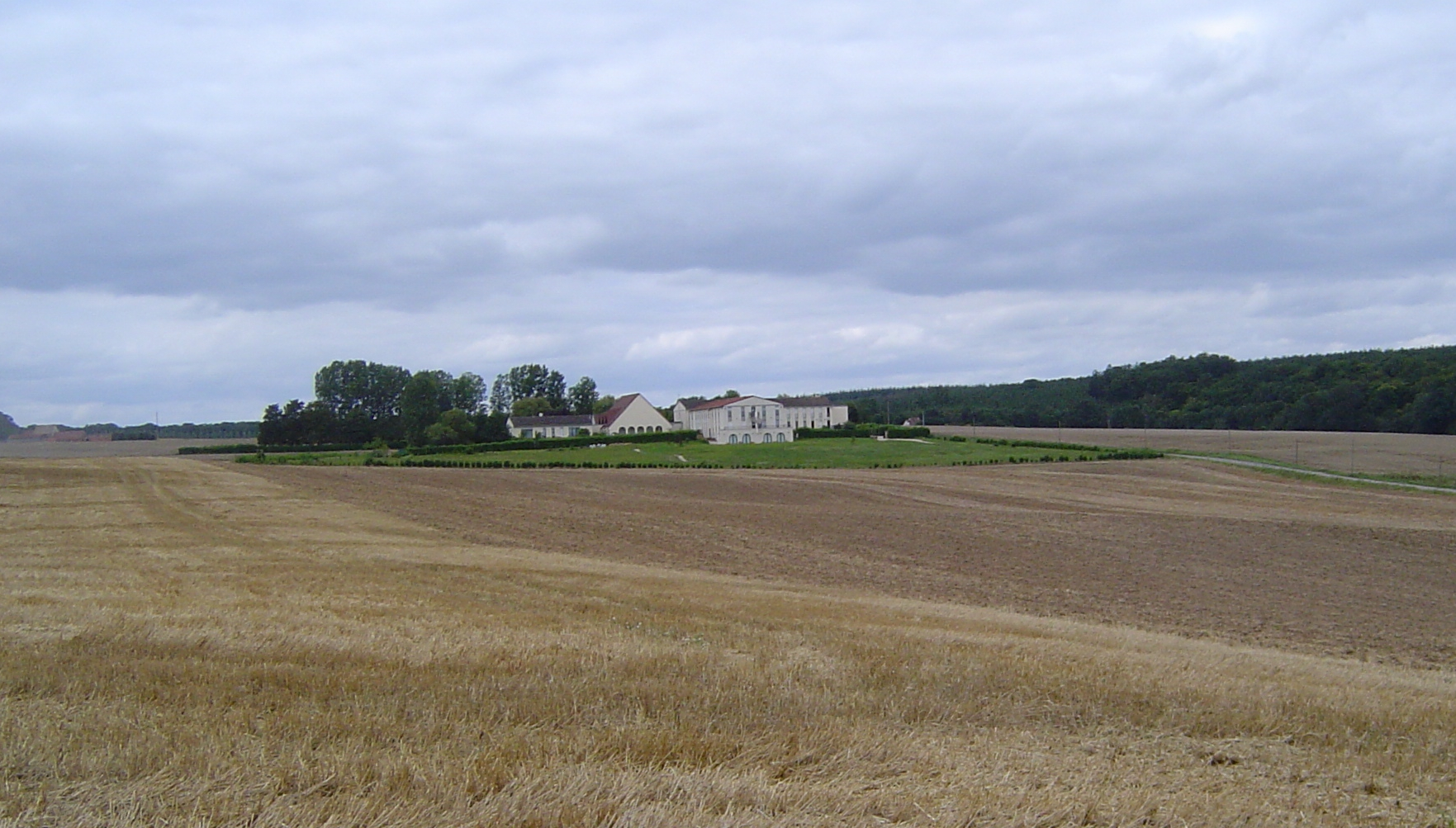 BlaruBSCM